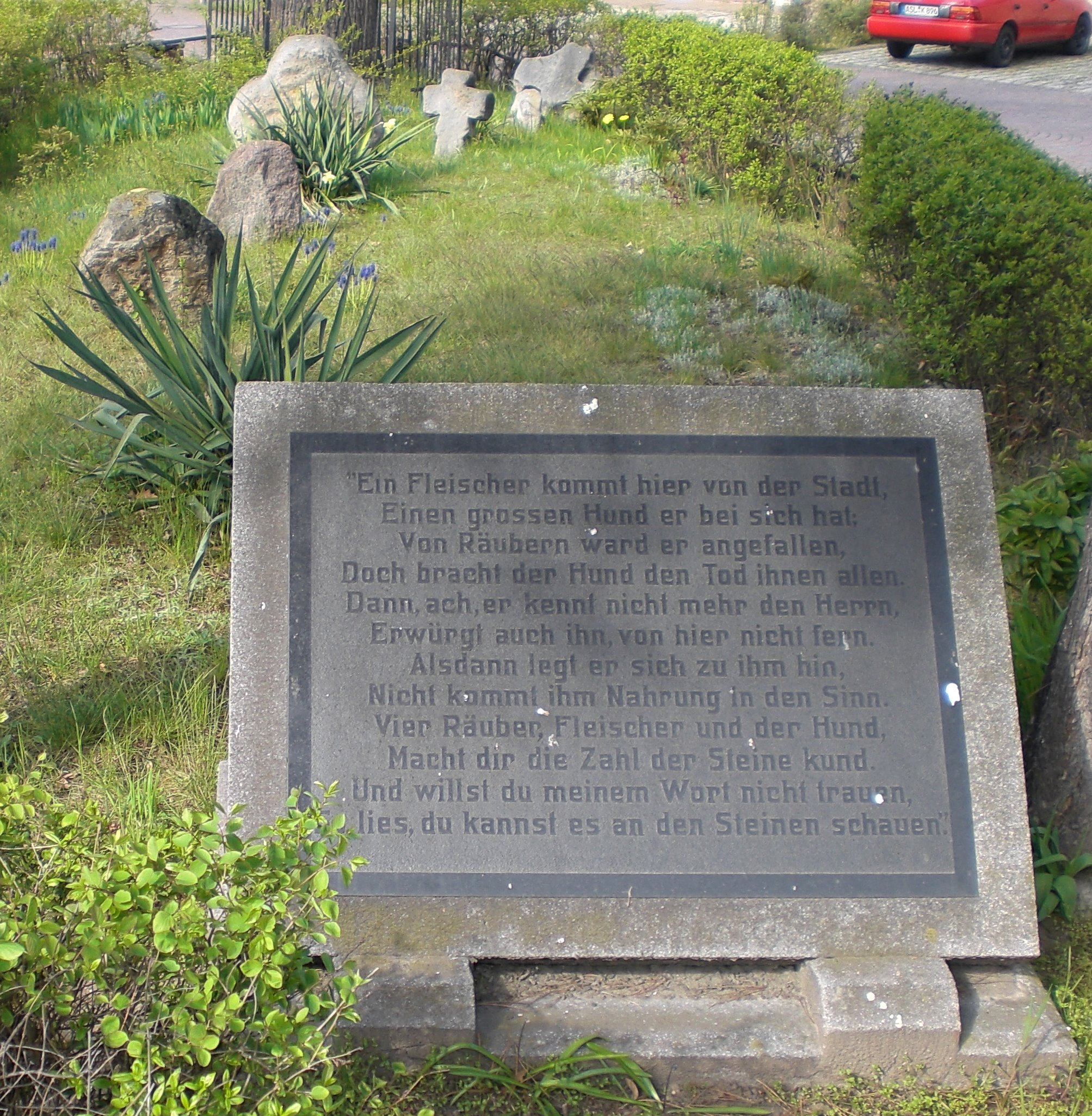 Sechs Steine, Ilberstedt, mit Sagentafel